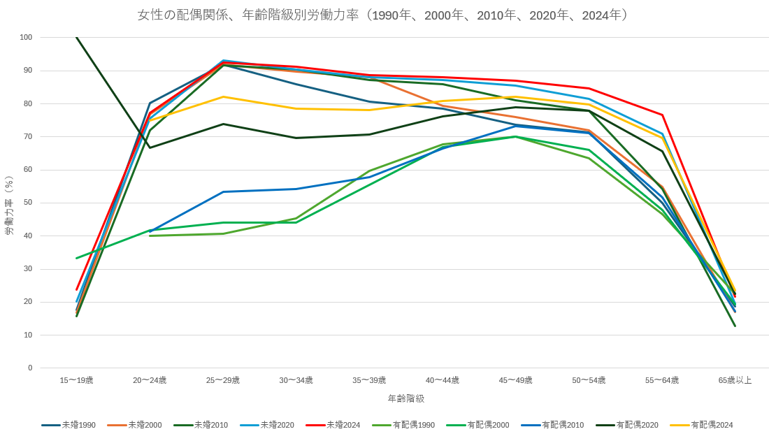 女性が結婚している場合としていない場合のそれぞれの年齢階級別の労働力率の推移を表している。